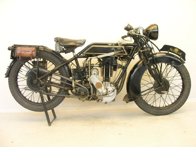 1928 Sunbeam Model 8 350cc